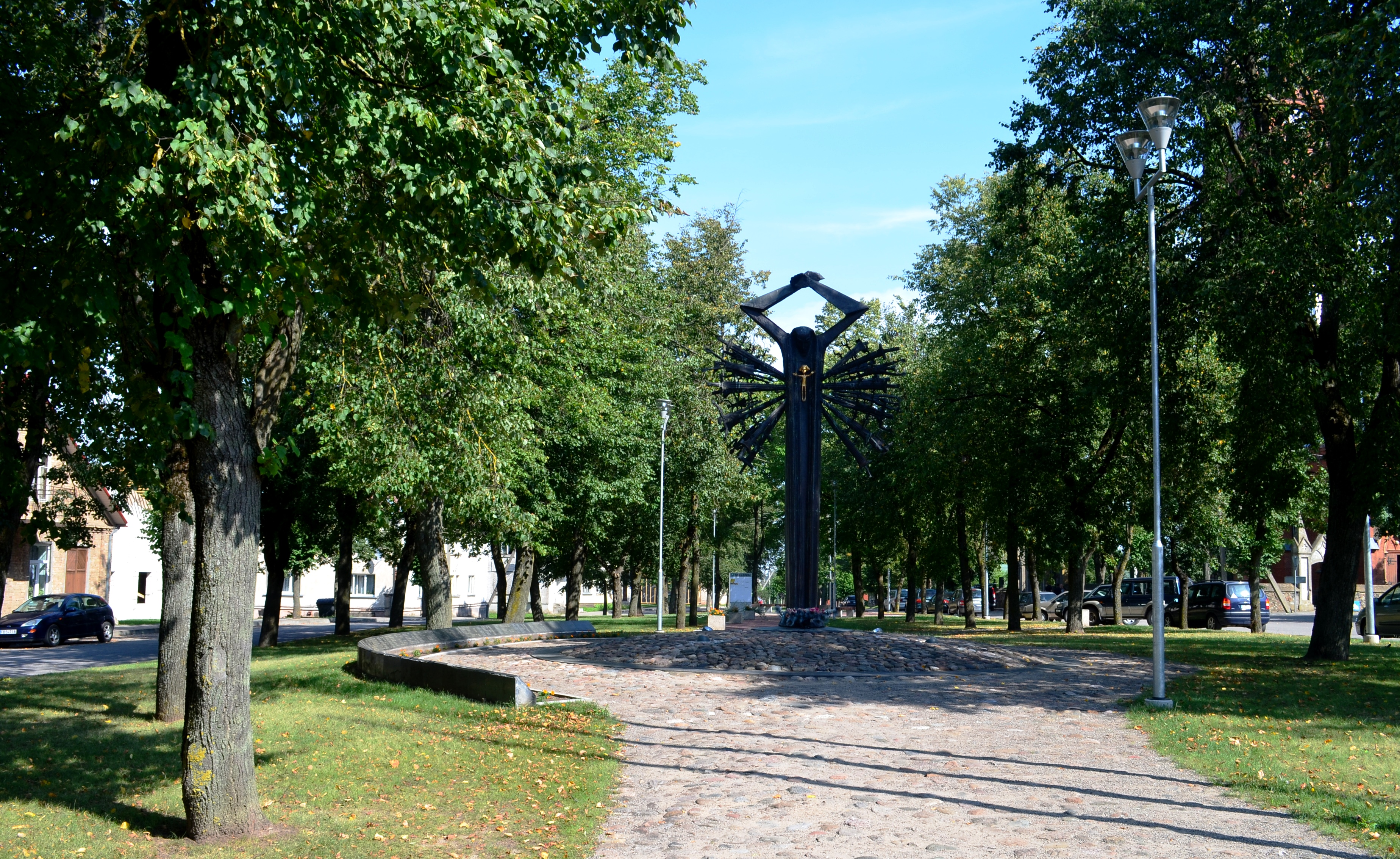 Paminklas komunizmo aukoms, Ramygala, Panevėžio r.